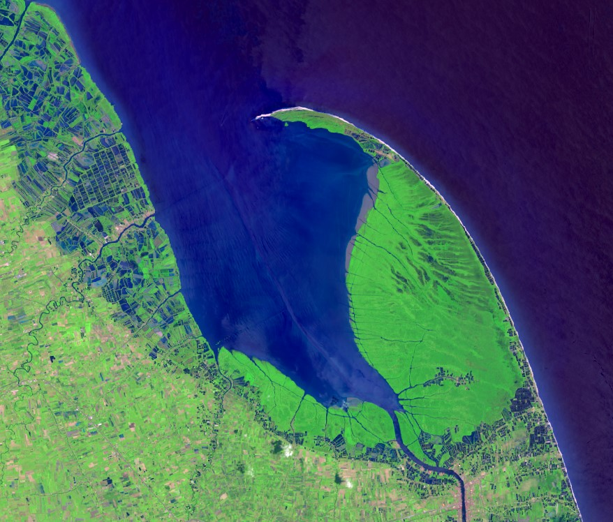 แหลมตะลุมพุก